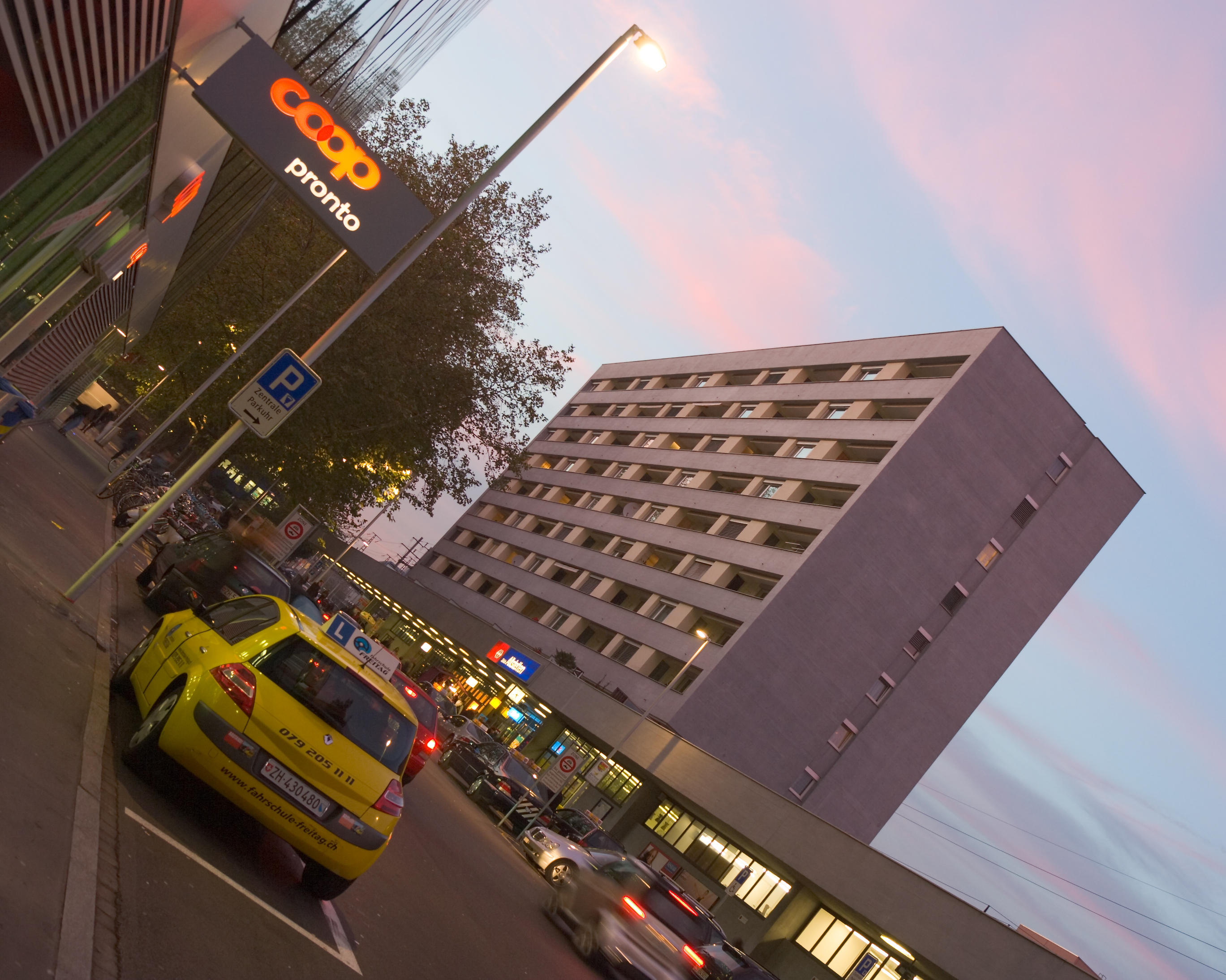 Das Abendrot über dem Bahnhof Altstetten in Zürich, Schweiz